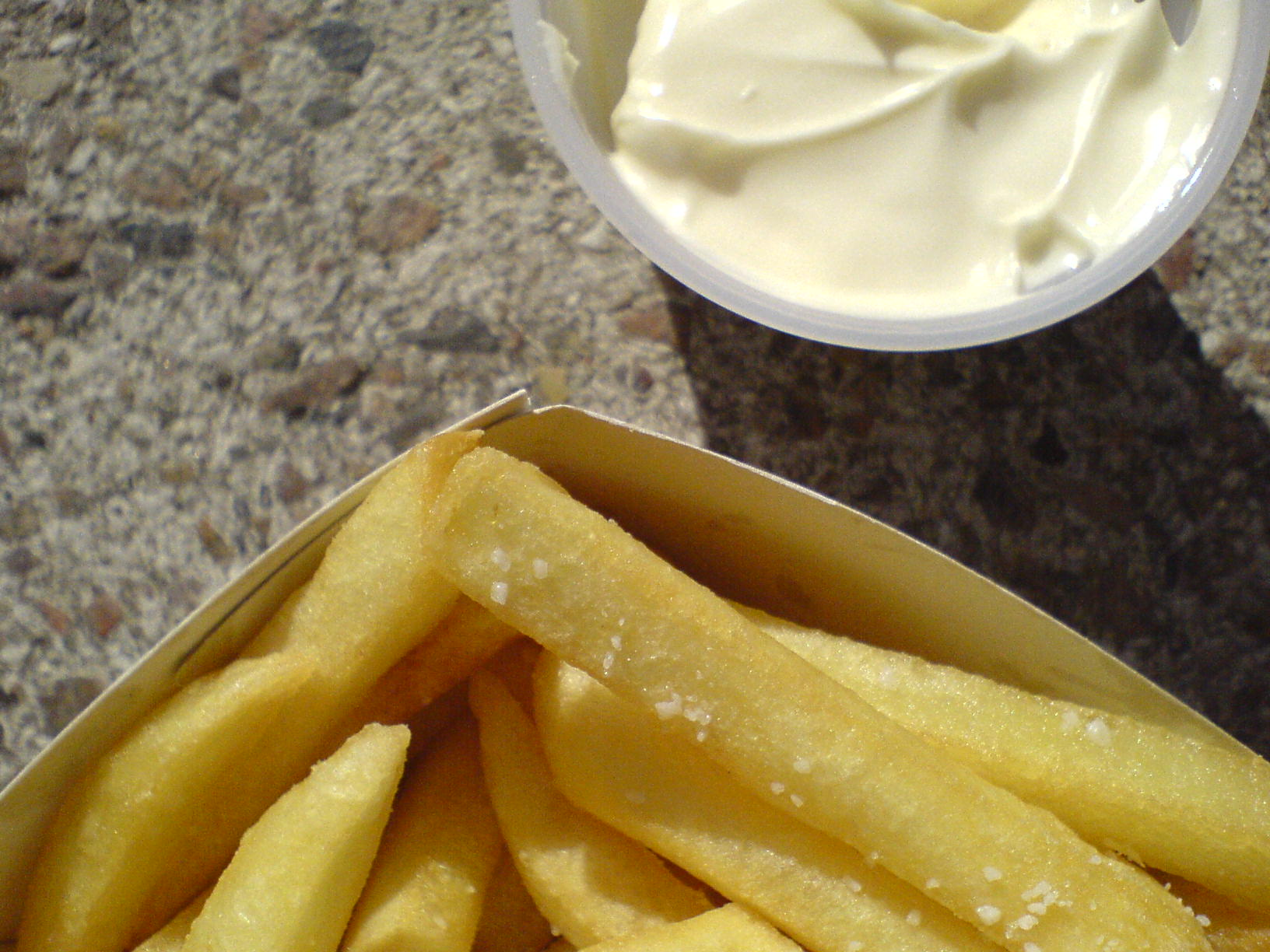 Pommes frites med salatmayonnaise